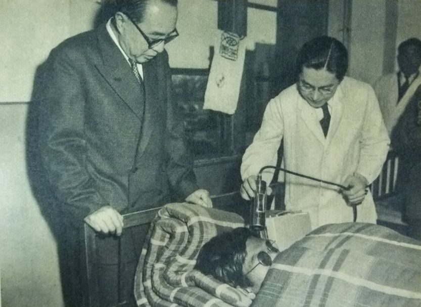 治療を受ける第五福竜丸乗組員